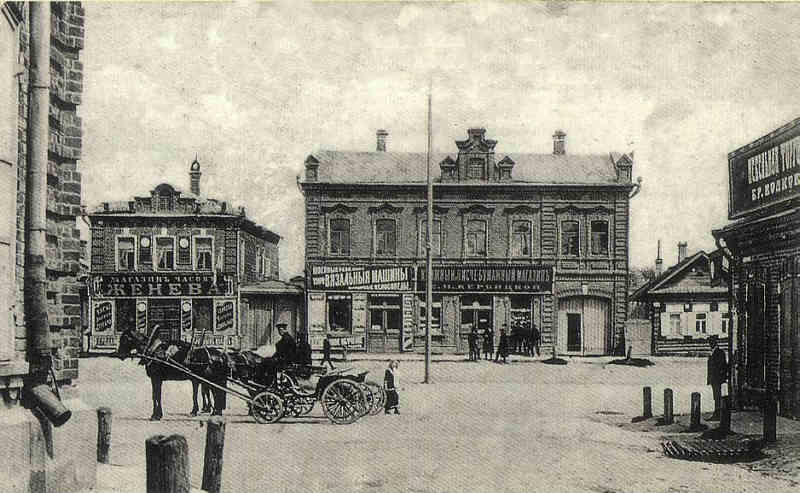 На Георгиевской улице Иваново-Вознесенска. Неизвестный фотограф, 1890-е.